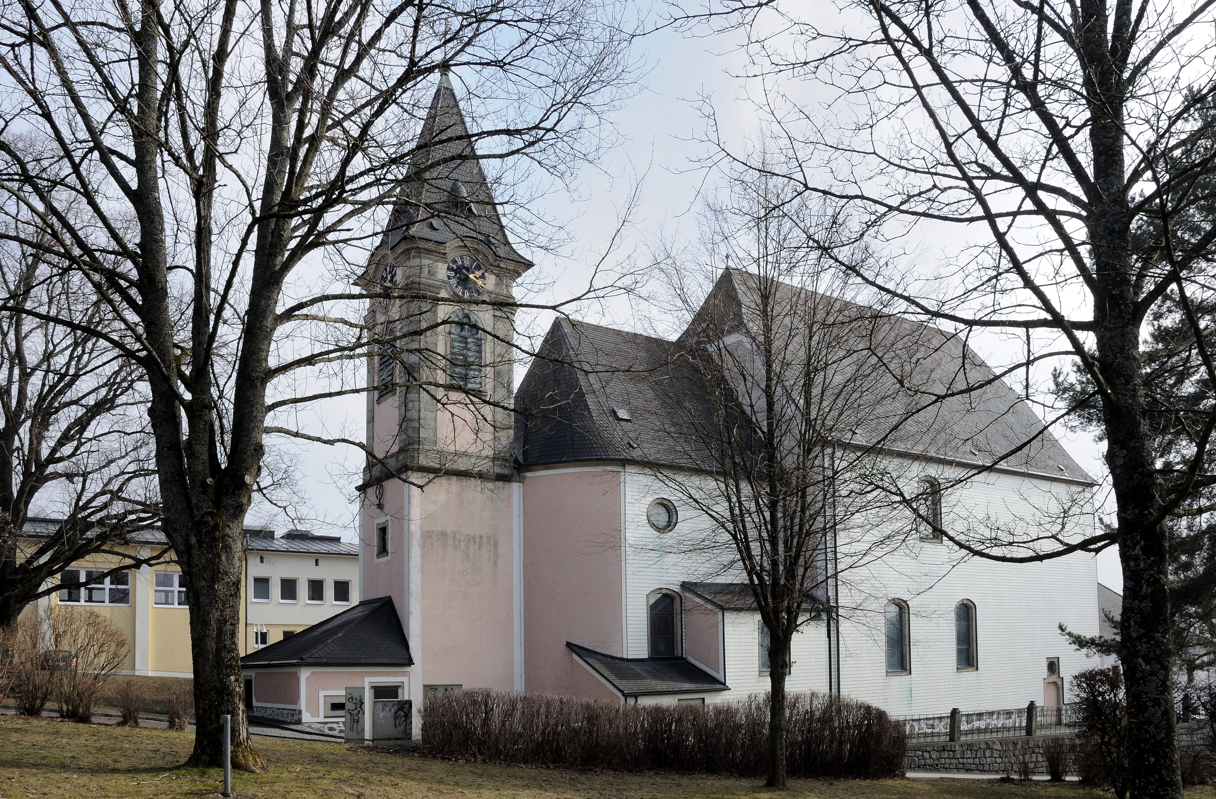 Kath. Filialkirche Maria Schutz am Bründl